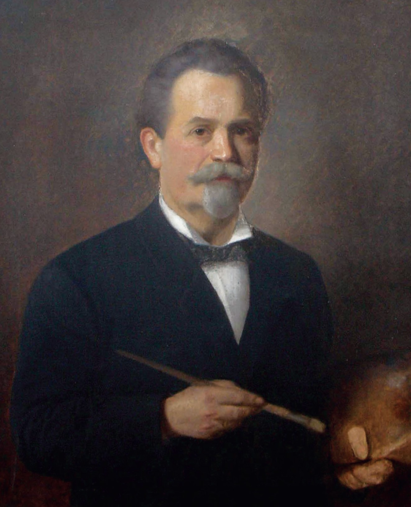 Josef Ladislav Šichan - autoportrét